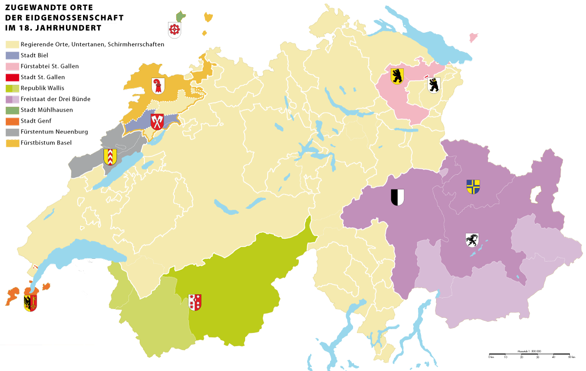 Die Zugewandten Orte der 13 «Alten Orte» (alte Kantone) der schweizerischen Eidgenossenschaft und ihr direkt beherrschtes Territorium im 18. Jahrhundert